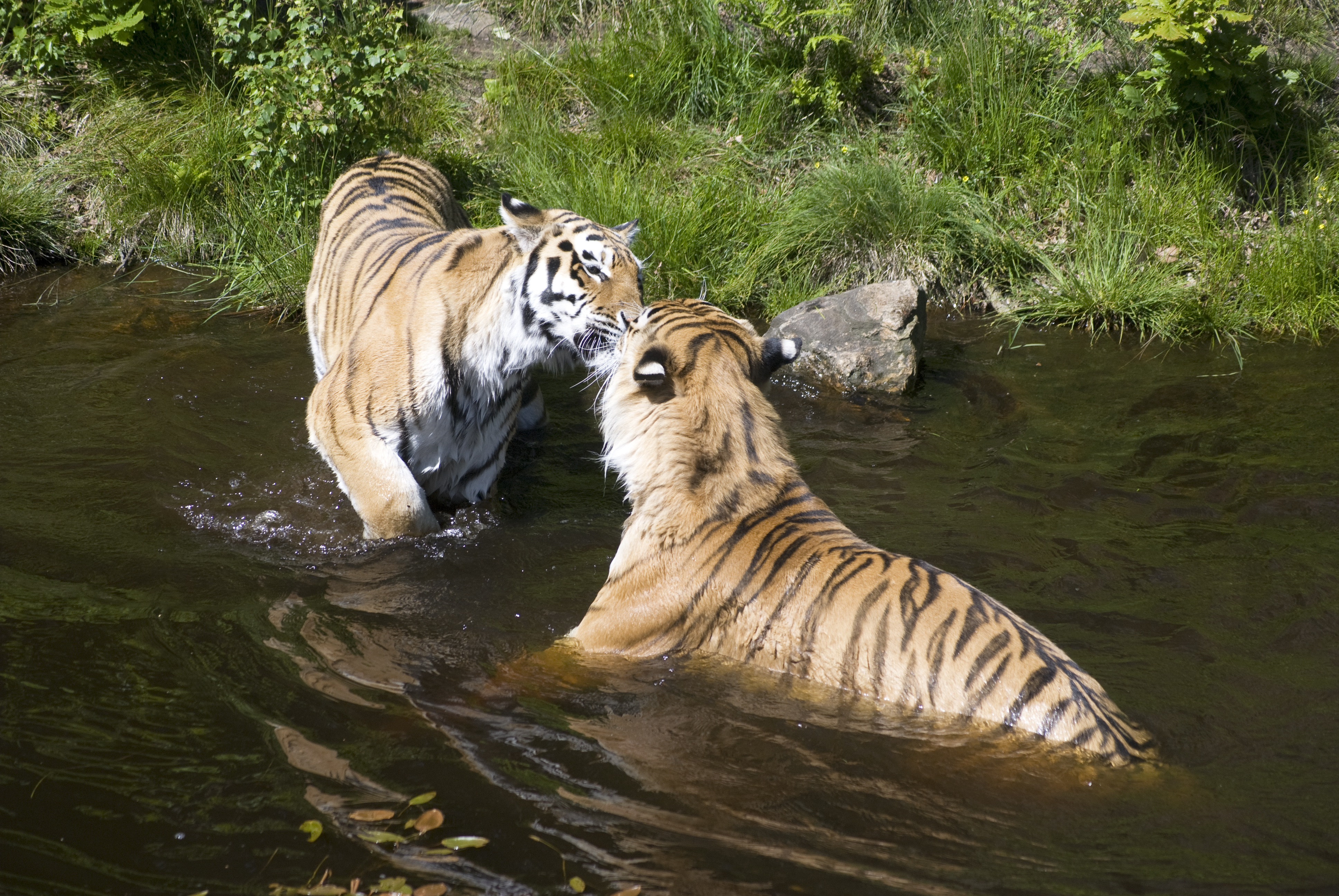 Swimming Tigers